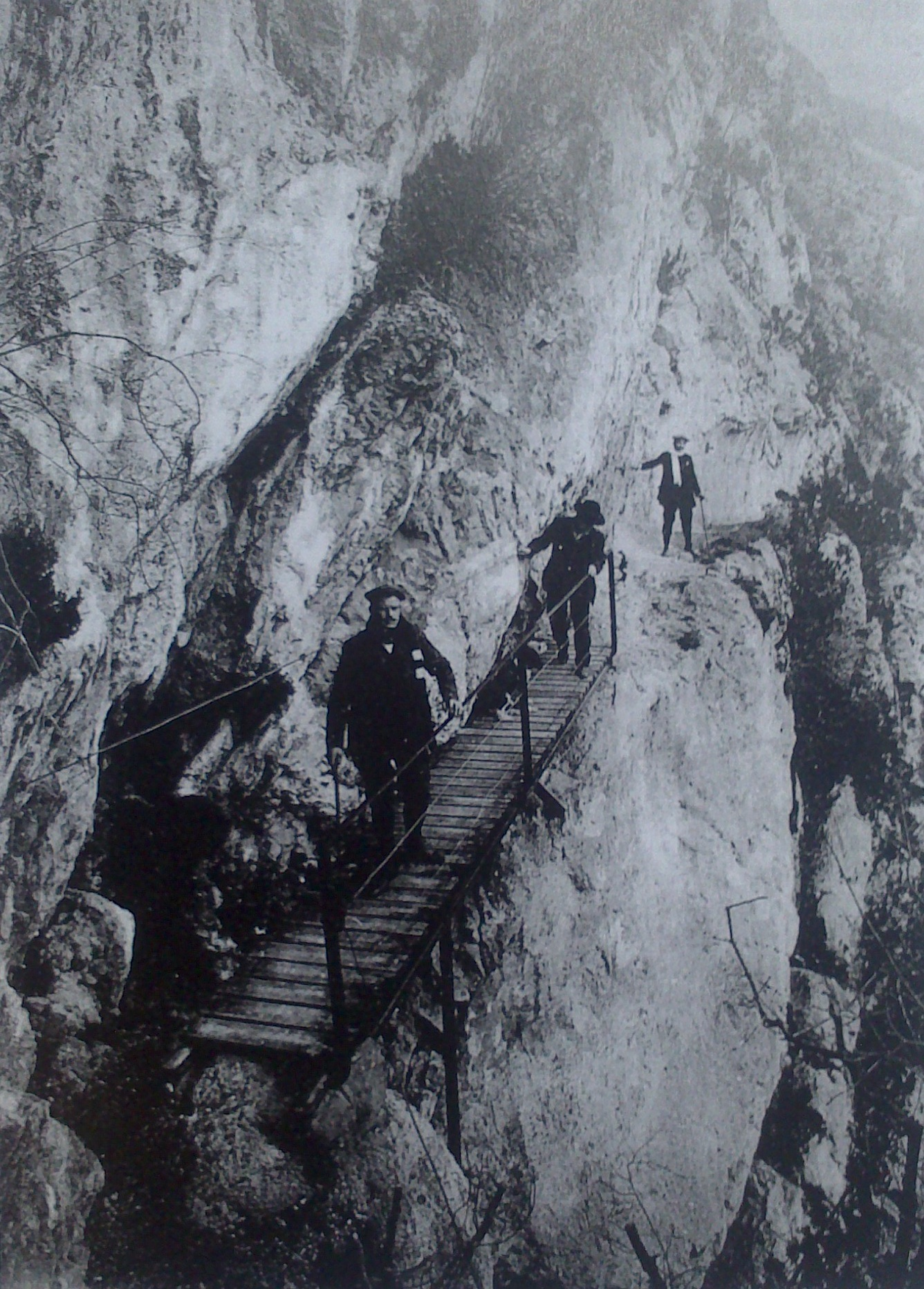 La passerelle du chemin romain au Néron (document ancien)